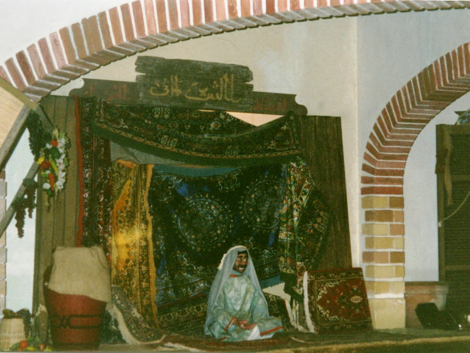 WalibiPalaisAlibaba